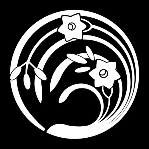 「水仙丸」紋（染抜）